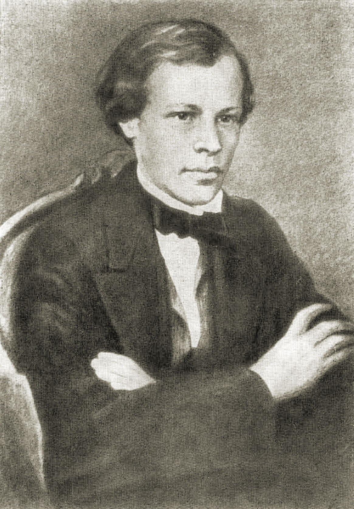 Д. И. Менделеев, 1855